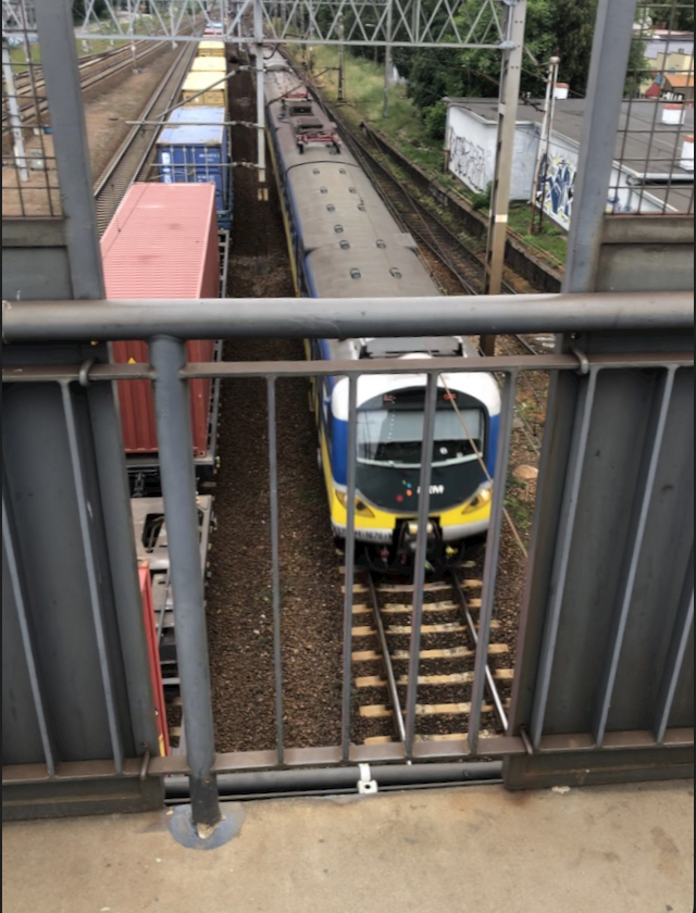 EN57AKM wjeżdzający na stację SKM w Gdyni Orłowie